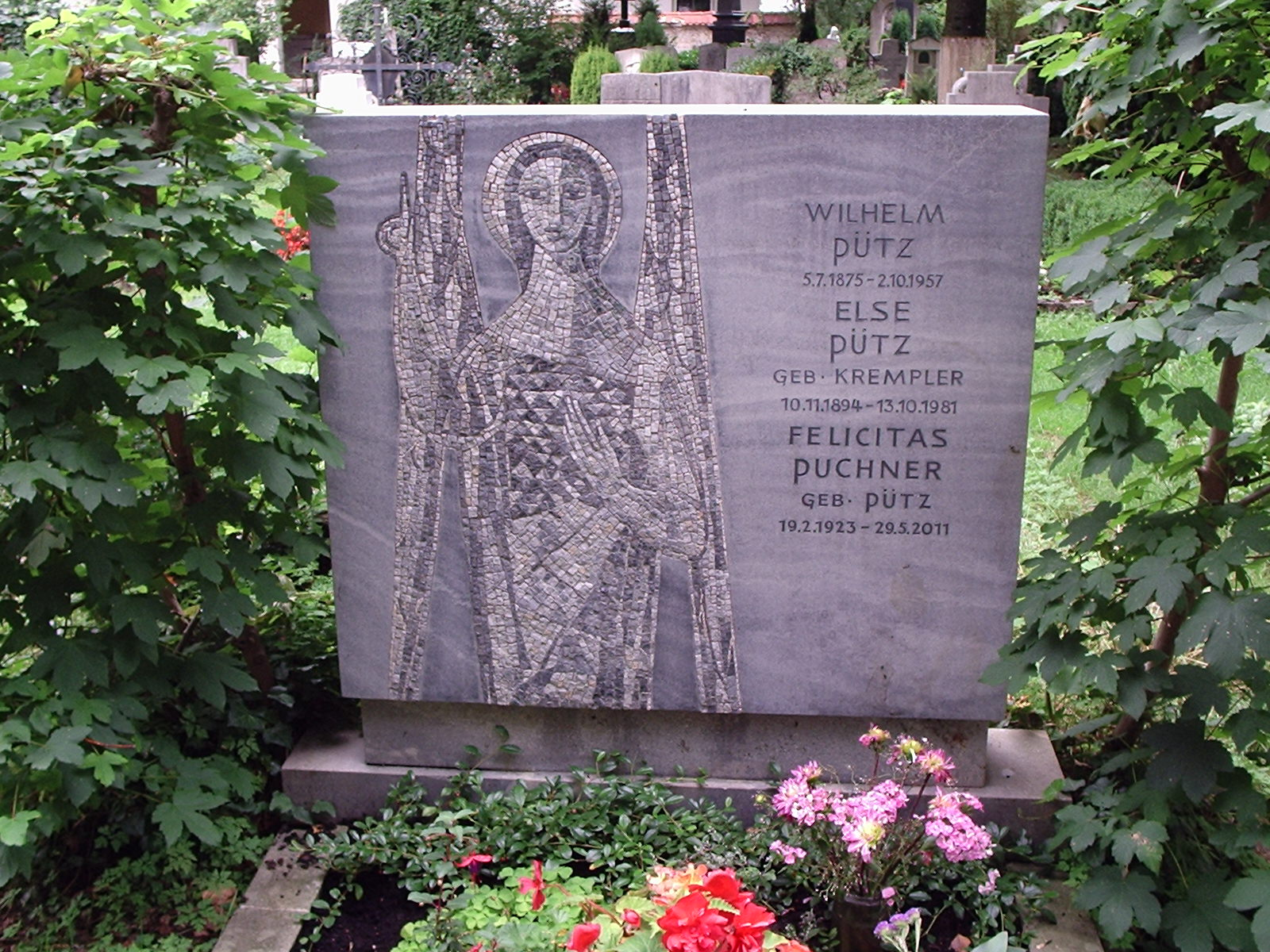 Grabstätte Wilhelm Pütz (Maler und Mosaikkünstler), Friedhof Solln, München